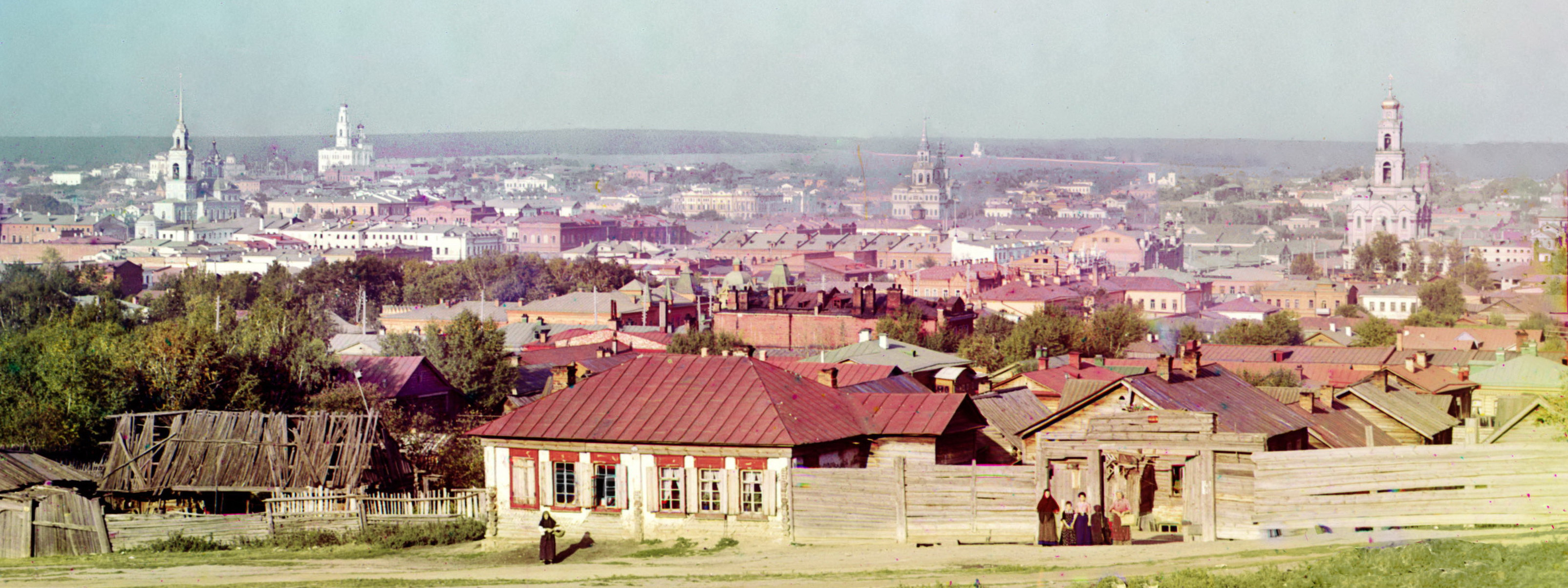 Панорама центральной части Екатеринбурга начала XX века. Фото С.М. Прокудина-Горского.